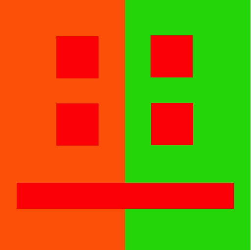 Das gleiche Rot erscheint in orangefarbener Umgebung bläulich getrübt (weniger gesättigt) und in grüner Umgebung gesättigt und leuchtend. Das Beispiel zeigt, dass sich Komplementärfarben gegenseitig zu extremer Leuchtkraft steigern.